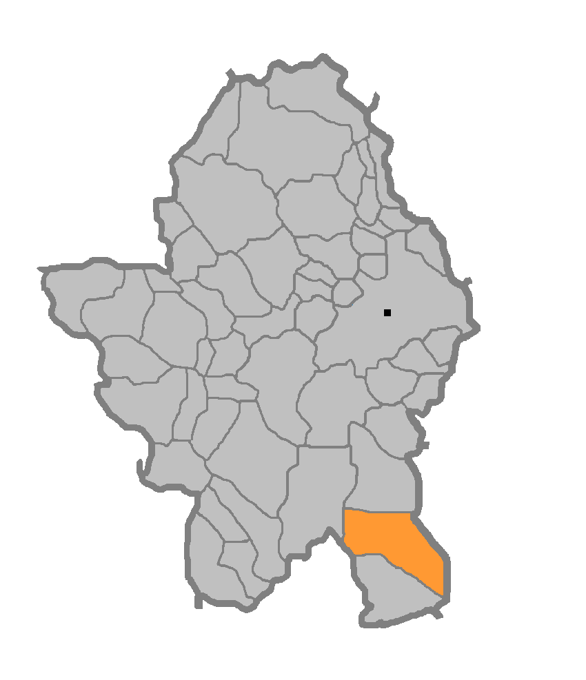 Мјесна заједница Агино Село